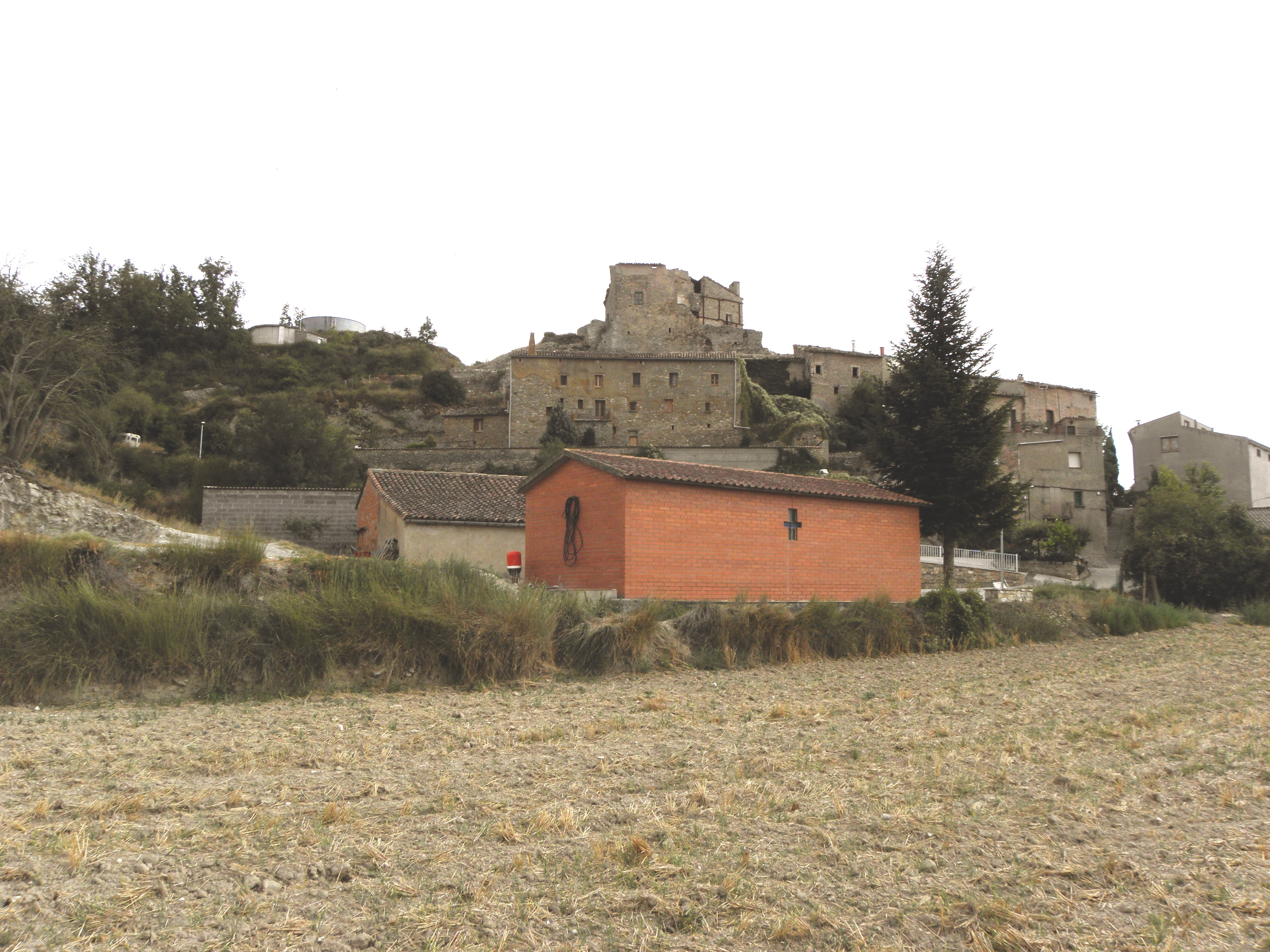 Enfesta (La Molsosa, Solsonès). En primer terme, la nova església (1979)